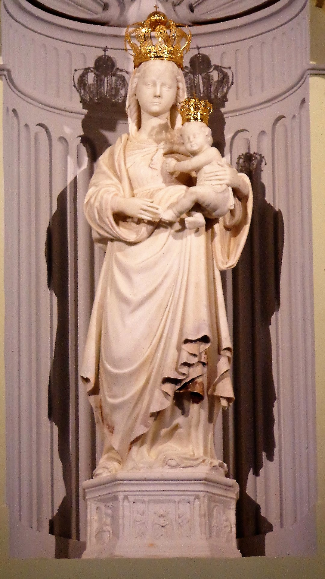 Statua Vergine col Bambino di scuola gaginesca chiesa di Santa Maria del Gesù Messina.